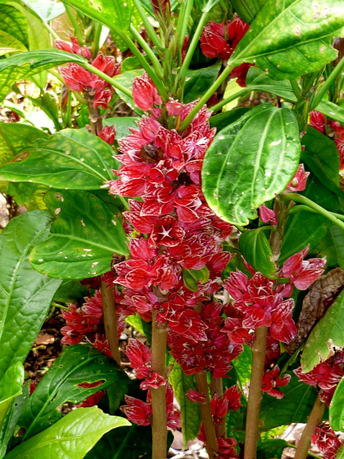 Pavonia strictiflora (syn. Goethea strictiflora) Malvaceae